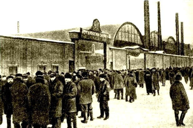 Бастующие рабочие у ворот Путиловского завода. Январь 1905 г.